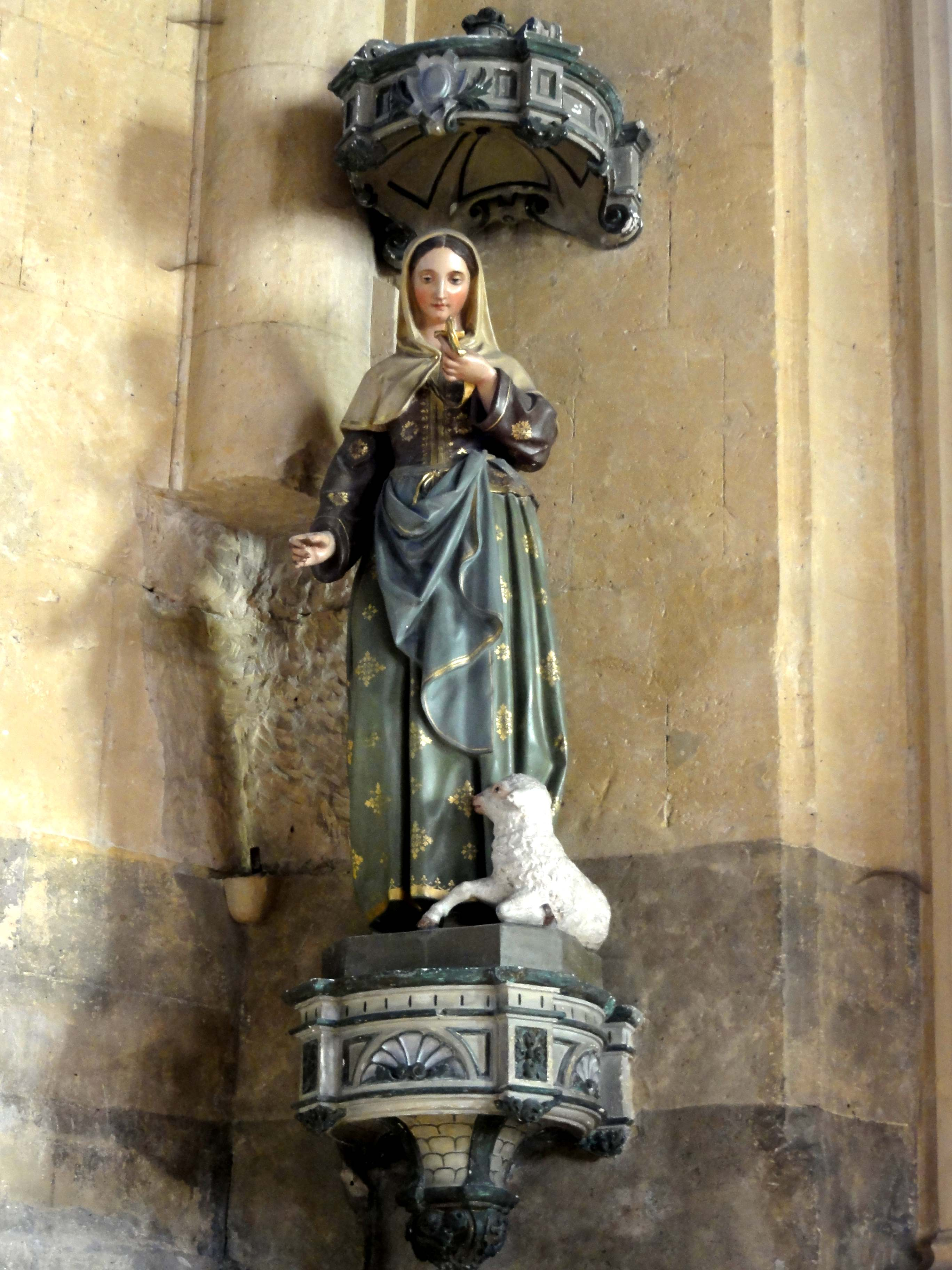 Statue de sainte Geneviève de Paris.